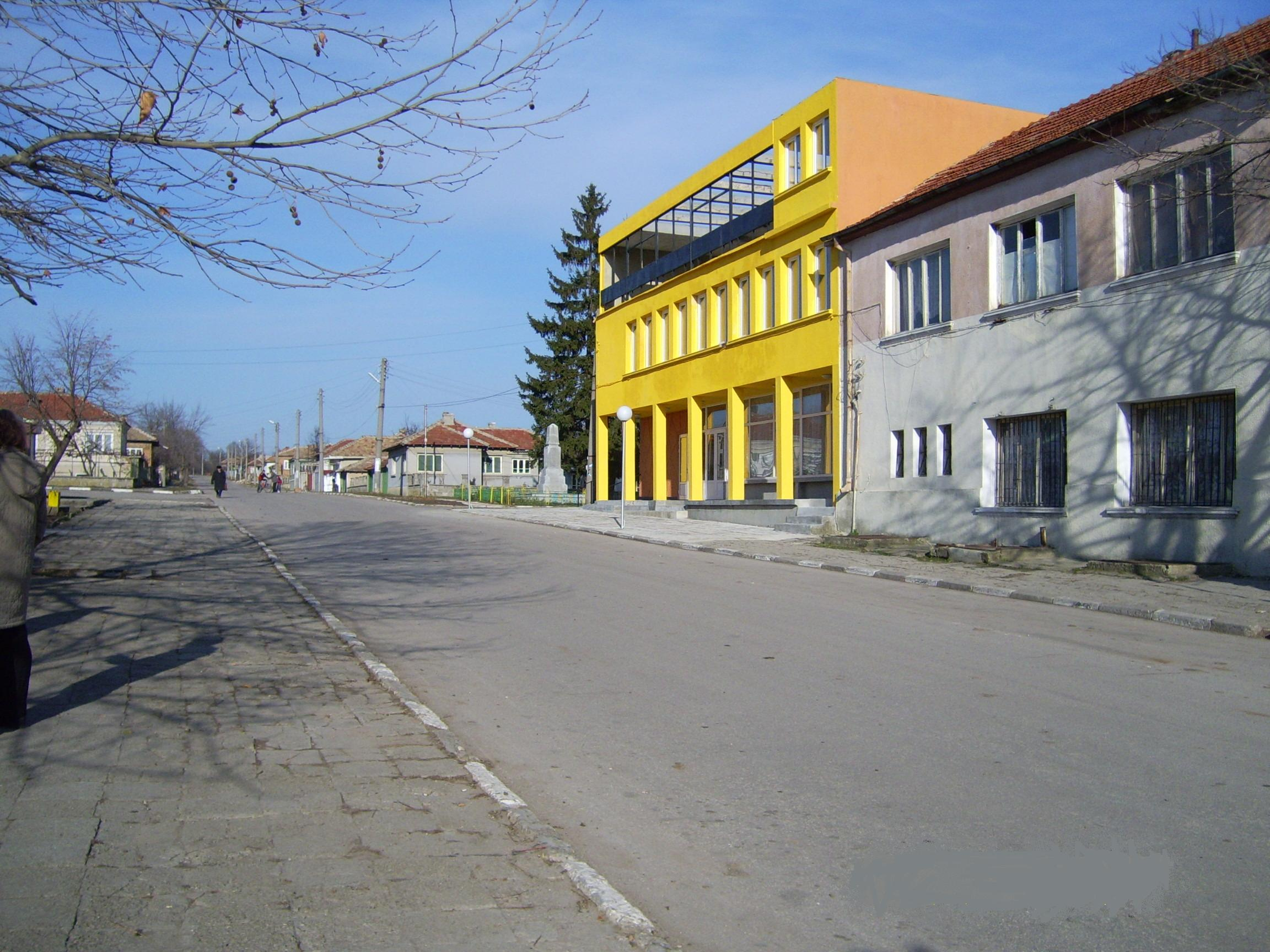 Снимка от центъра на село Доброплодно, България